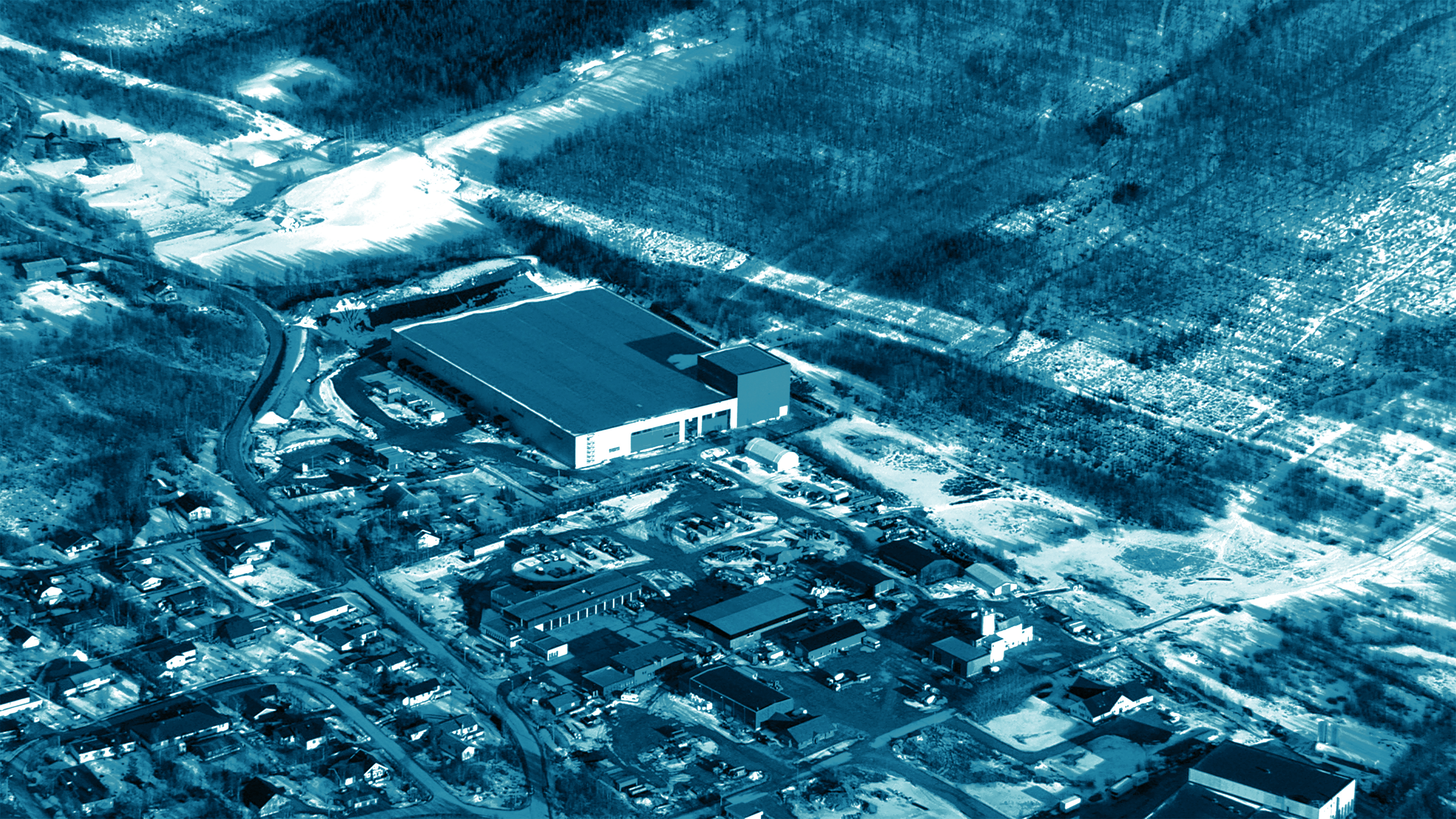 Flybilde